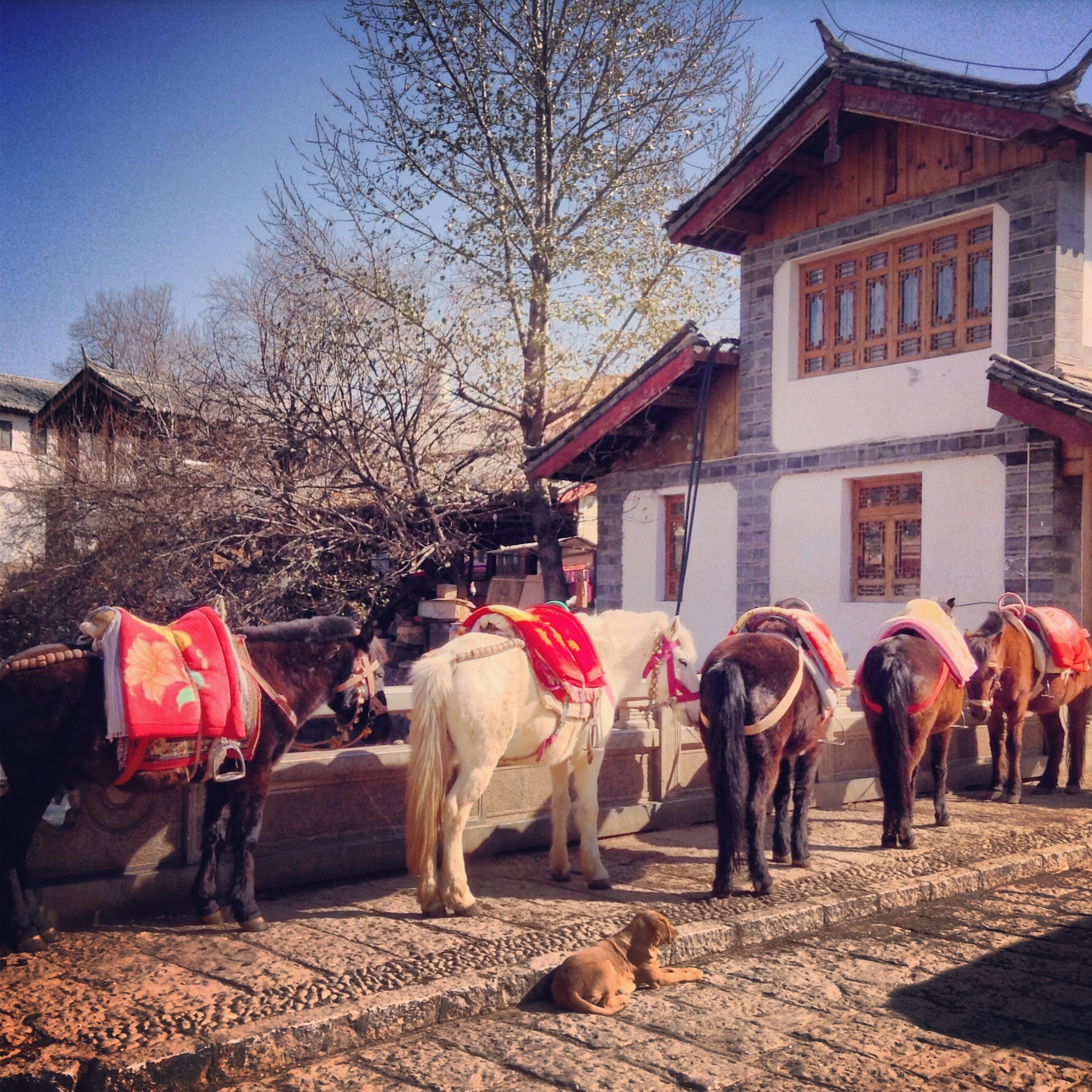 Chevaux dans la région de Lijiang